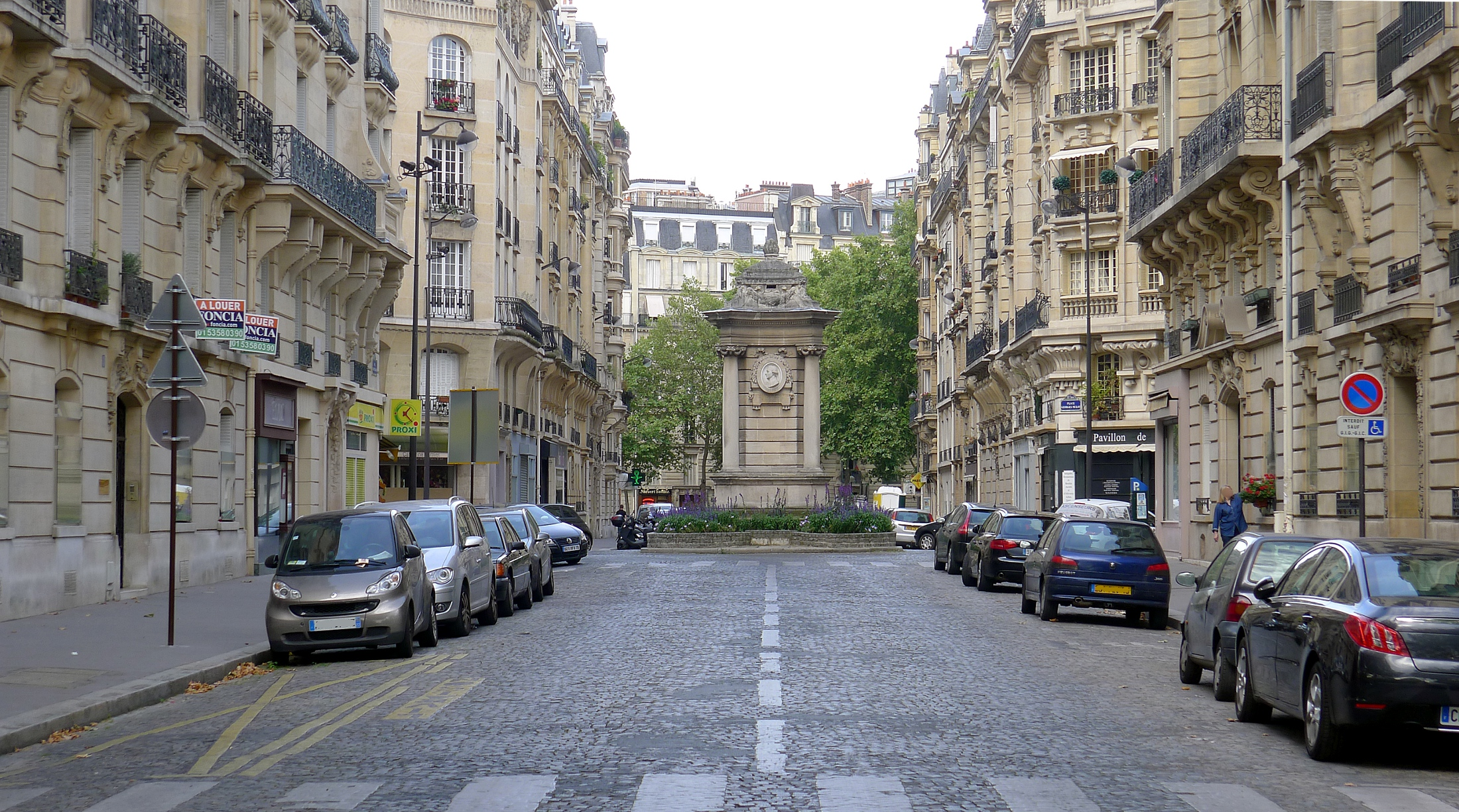 Rue Valentin-Haüy - Paris XV